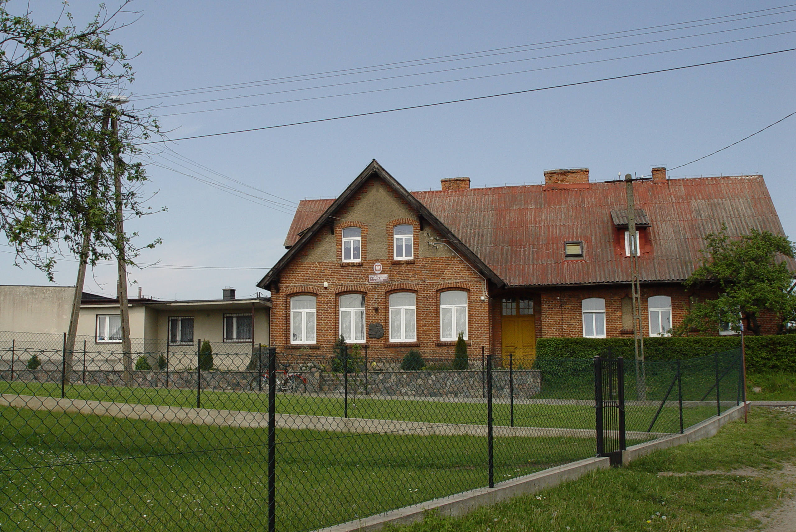 Szkoła podstawowa im. Józefa Dambka w Leśniewie